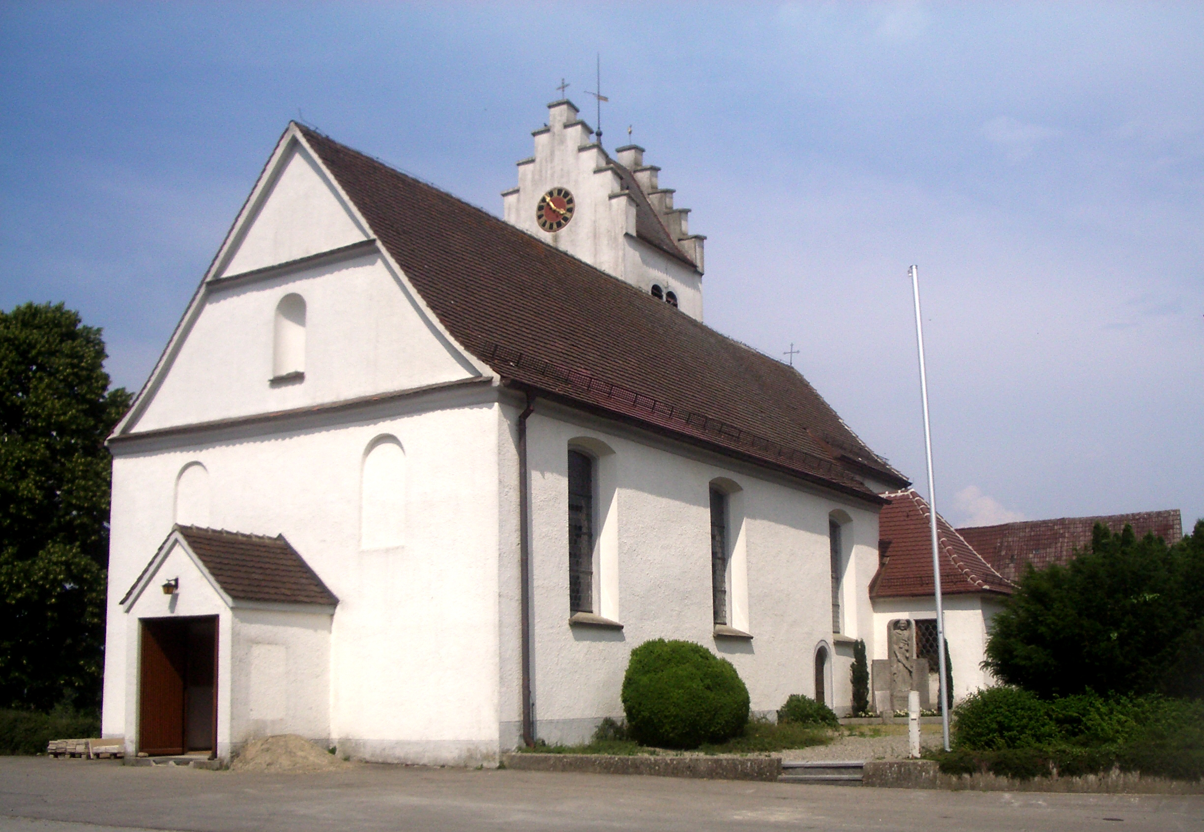 Horgenzell: Pfarrkirche St. Ursula, Horgenzell (während der Renovierung 2005)